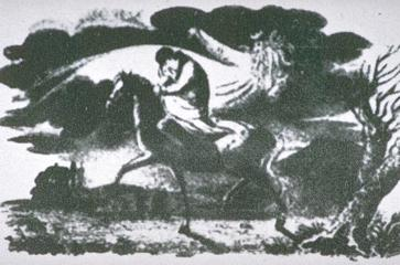 Erlkonig